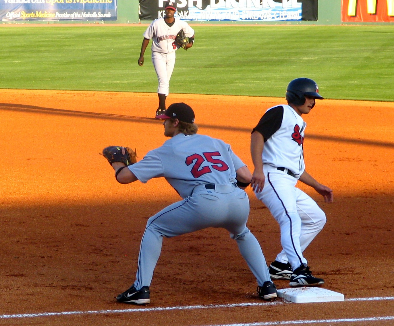 Autore: brent nashville Descrizione: Un corridore tocca il cuscino di prima base per evitare un pickoff Origine: Flickr URL